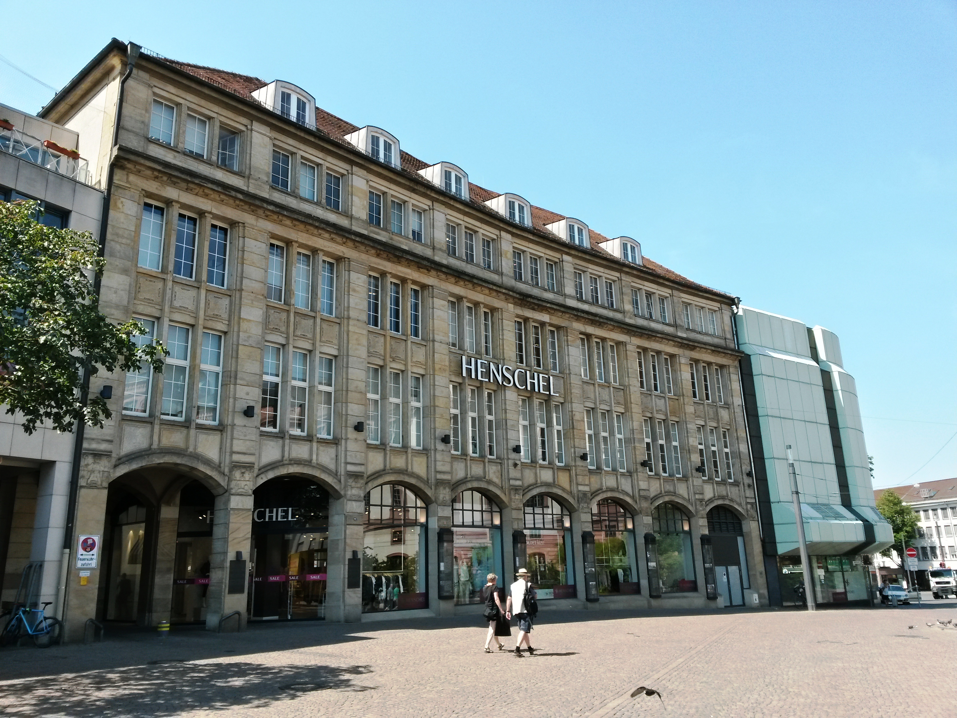 Historische Fassade des Kaufhaus Henschel (ehemals Kaufhaus Rothschild) in Darmstadt, Marktplatz 2: nach Plänen der Architekten Georg Küchler und Georg Wickop in den Jahren 1908 und 1913–1914 erbaut. Bei einem Luftangriff im Jahre 1944 wurde das Bauwerk bis auf die dem Marktplatz zugewandte Fassade zerstört. In den Jahren 1946 bis 1956 wurde das Kaufhaus nach Plänen des Architekten Peter Müller (1881–1960) wieder aufgebaut.